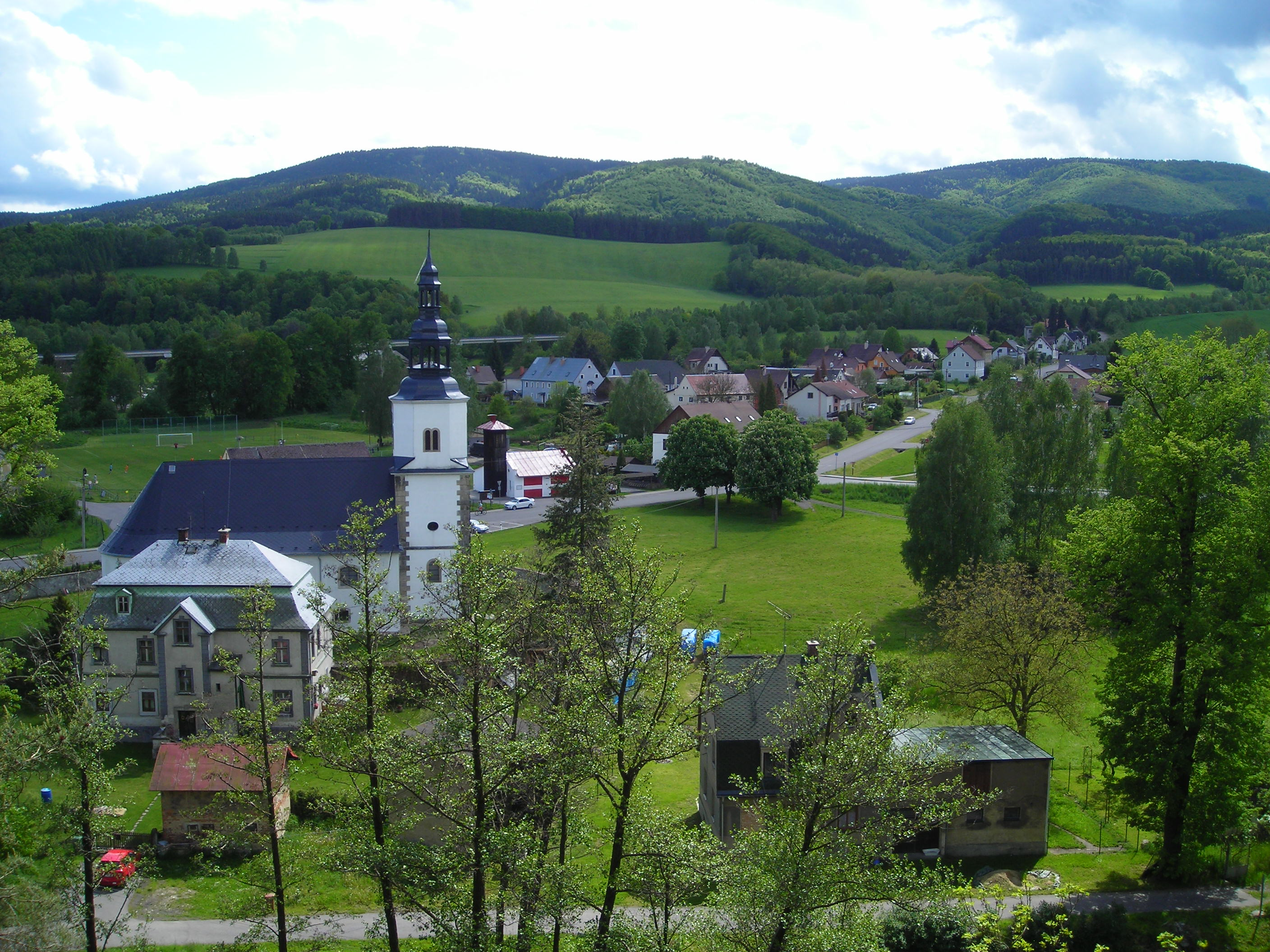 Pohled na obec Bílý Kostel nad Nisou z nové vyhlídky na skále nad obcí